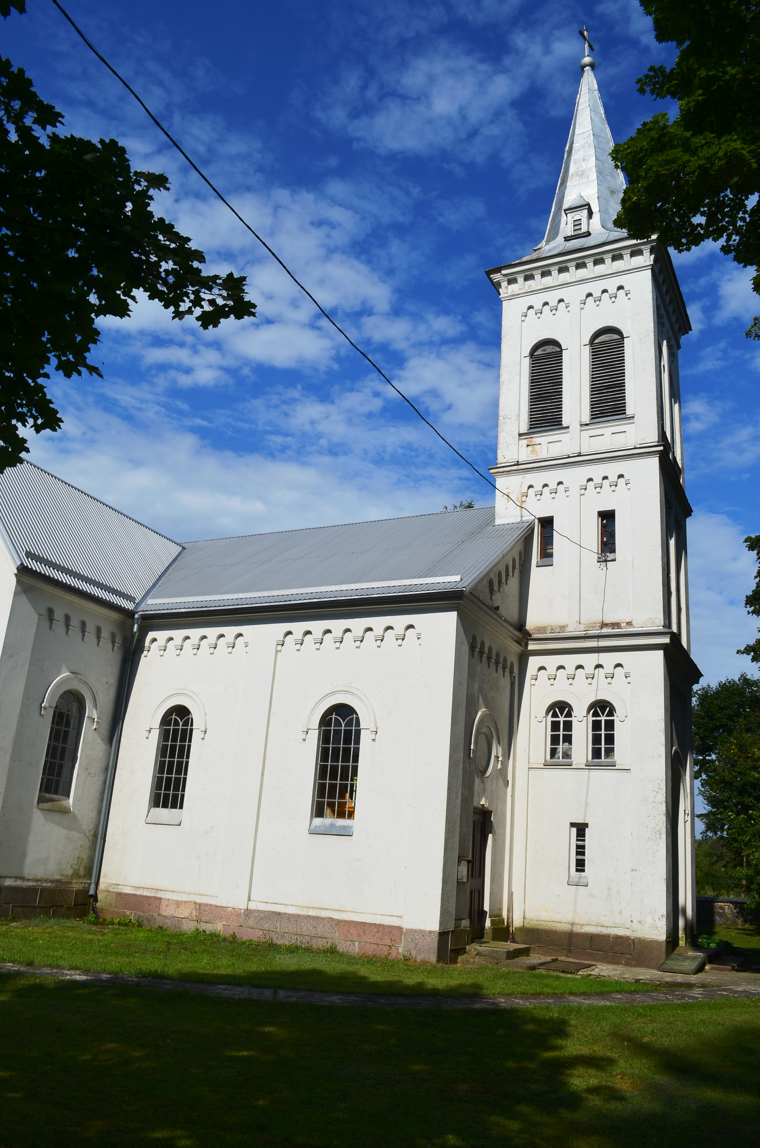 Bažnyčia, Karsakiškis, Panevėžio r.